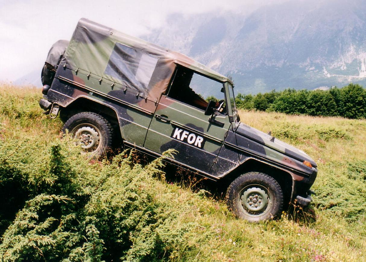 Mercedes Benz 250GD Kurz ohne Rüstsatz Funk der TF Prizren auf Patrouille